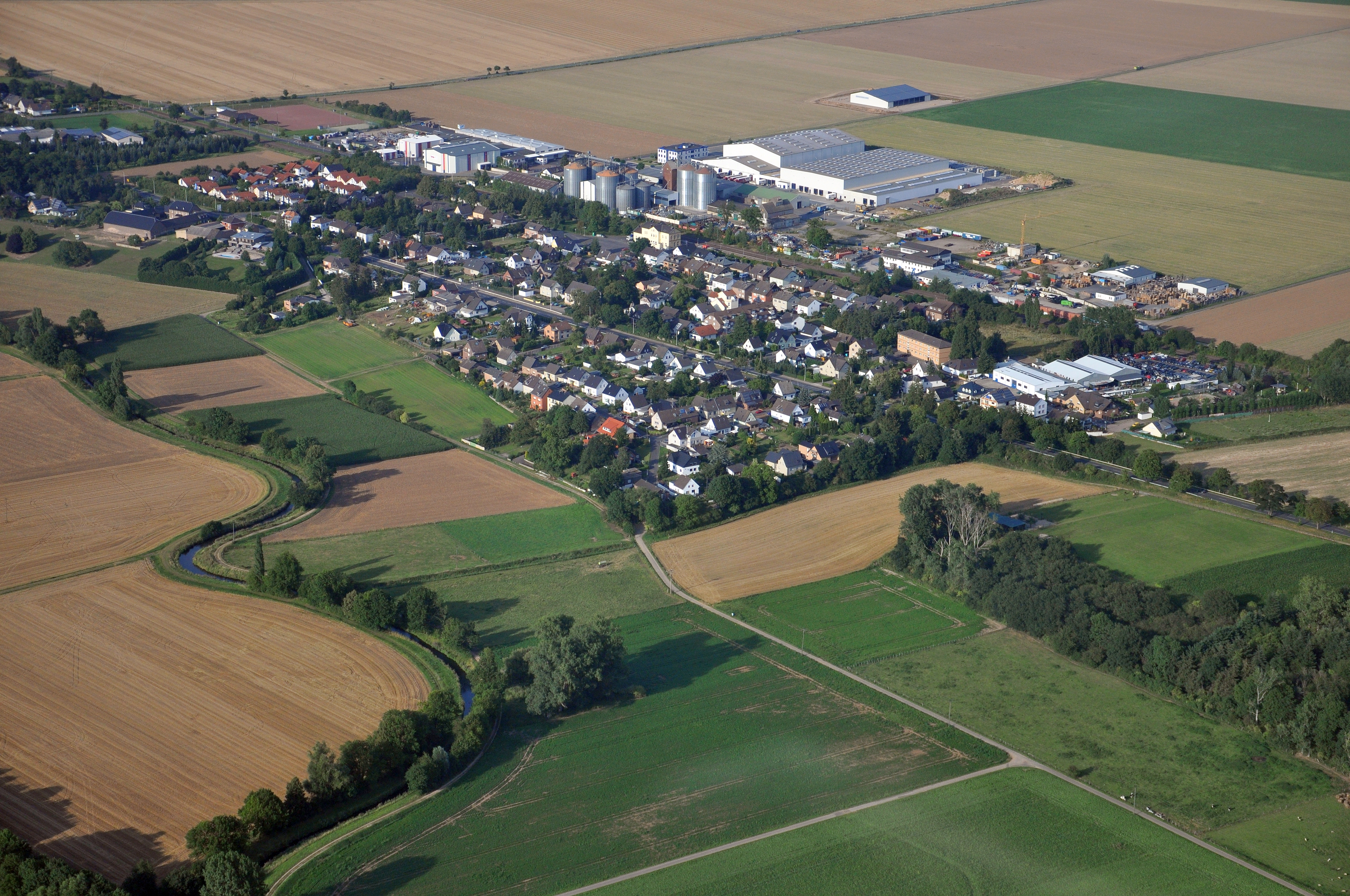 Ottenheim (Weilerswist) mit Erft